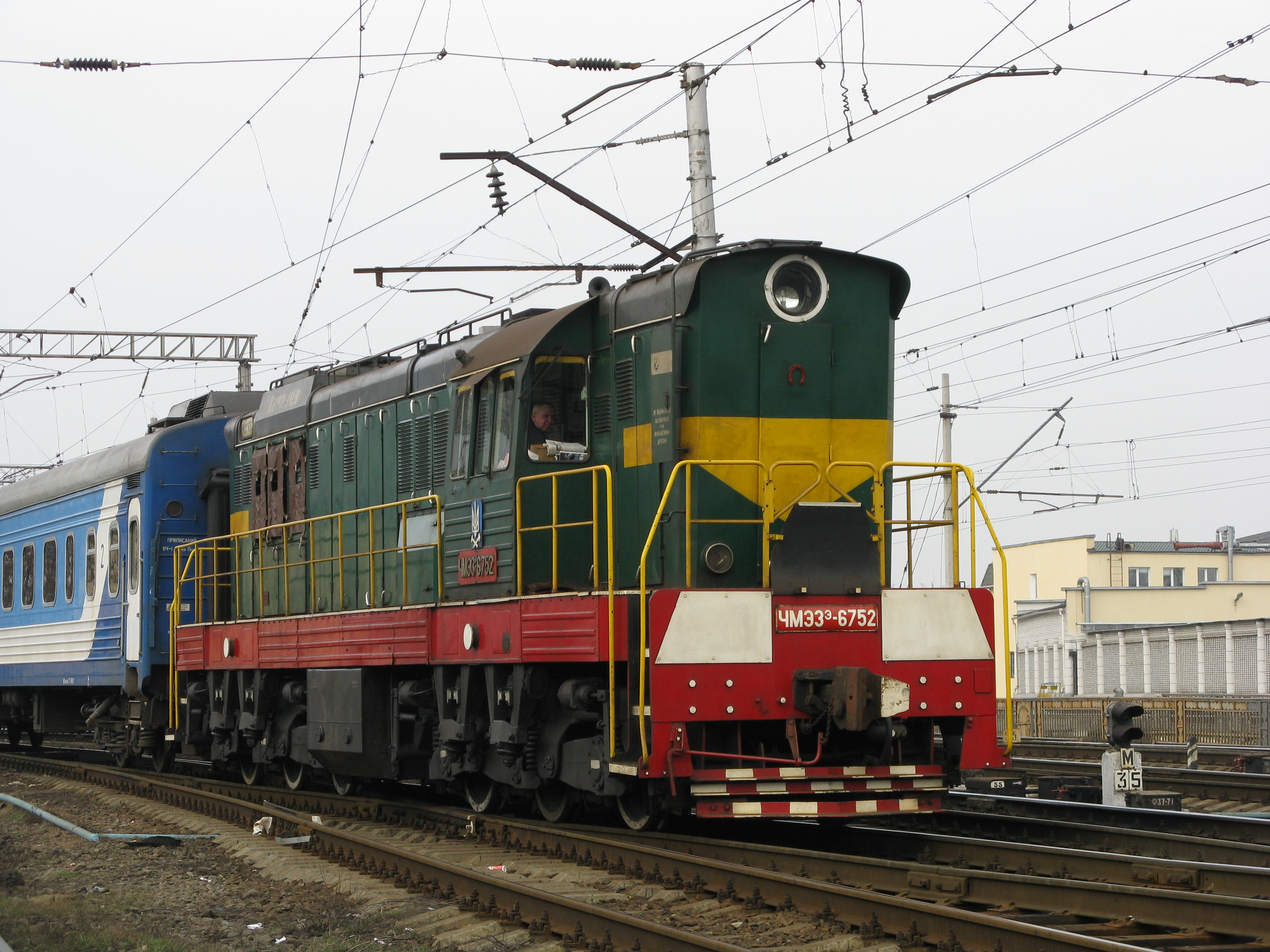 Тепловоз_ЧМЭ3э-6752